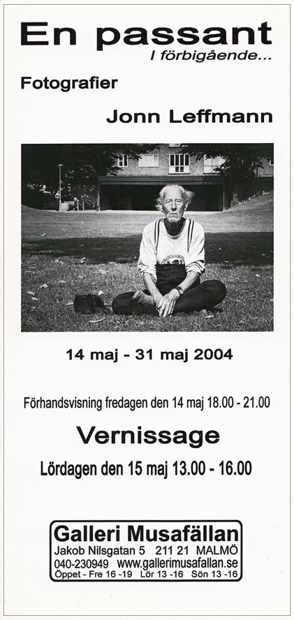 En passant vernissagekort 2004.